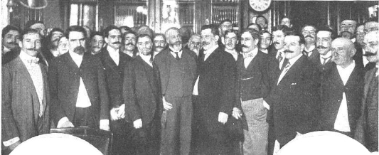 Asunción del nuevo Intendente de Buenos Aires. De derecha a izquierda: Manuel Guiraldes, el doctor Penna, el intendente interino Cayol, el vicealmirante Barilari y otros funcionarios.